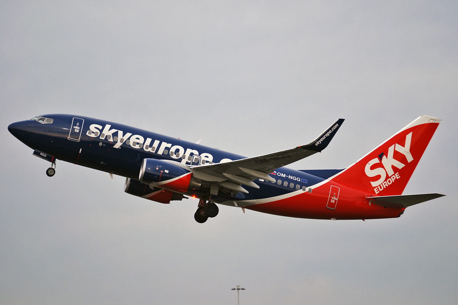 Boeing 737-76N. Amsterdam schiphol EHAM (17-02-2007)